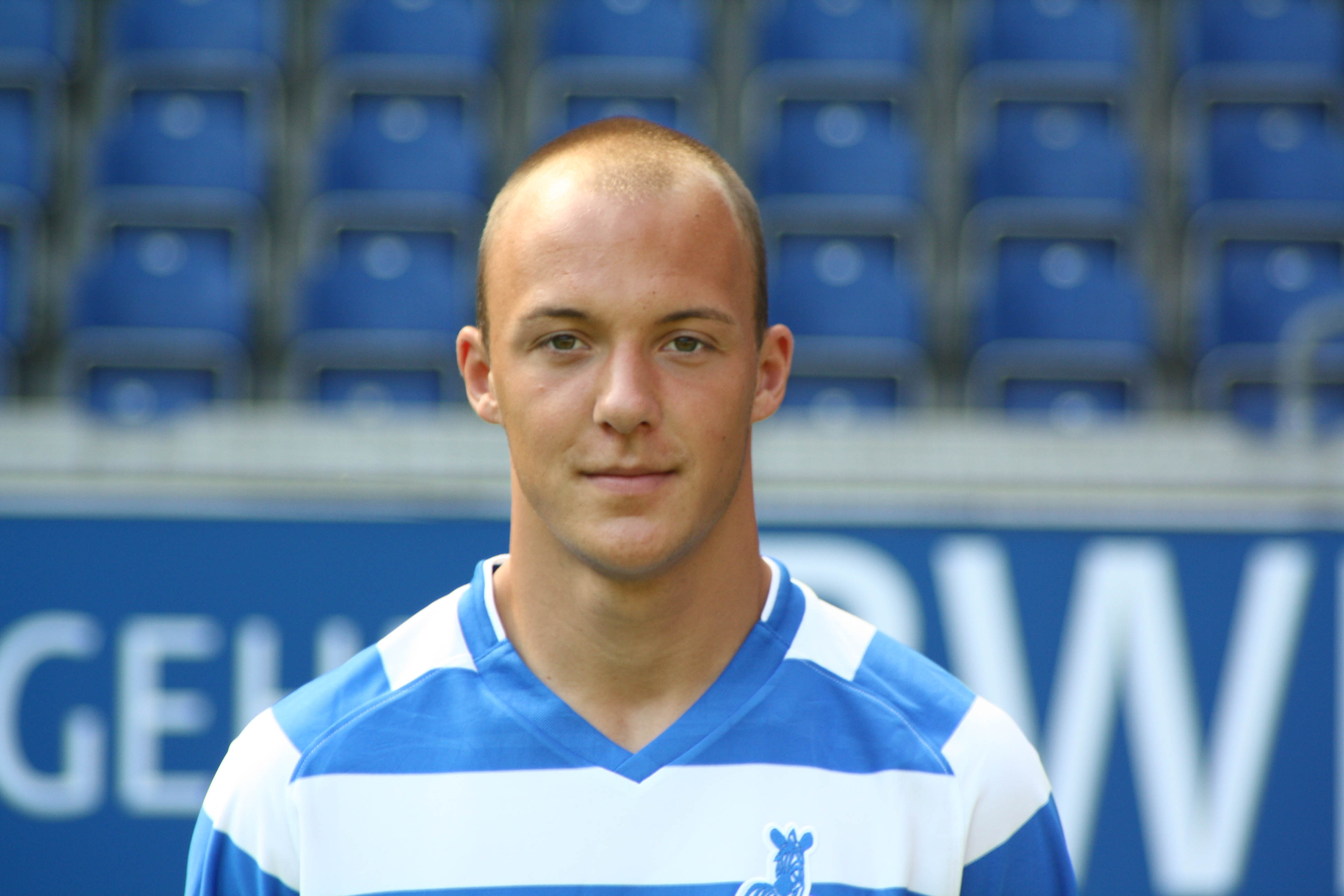 Maurice Exslager, MSV Duisburg